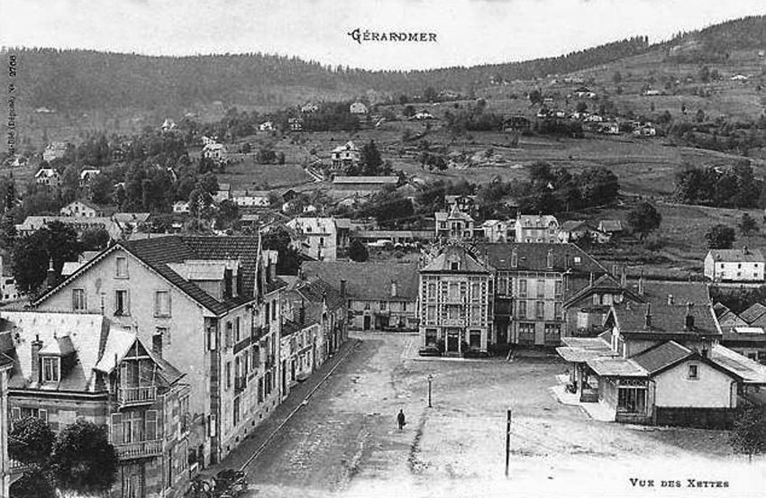 Gare de Gérardmer vers 1900, le bâtiment voyageurs de la compagnie du chemin de fer des Vosges.